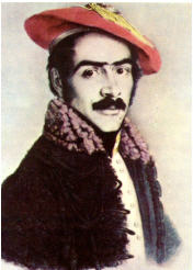 Gravat de Ramon Cabrera